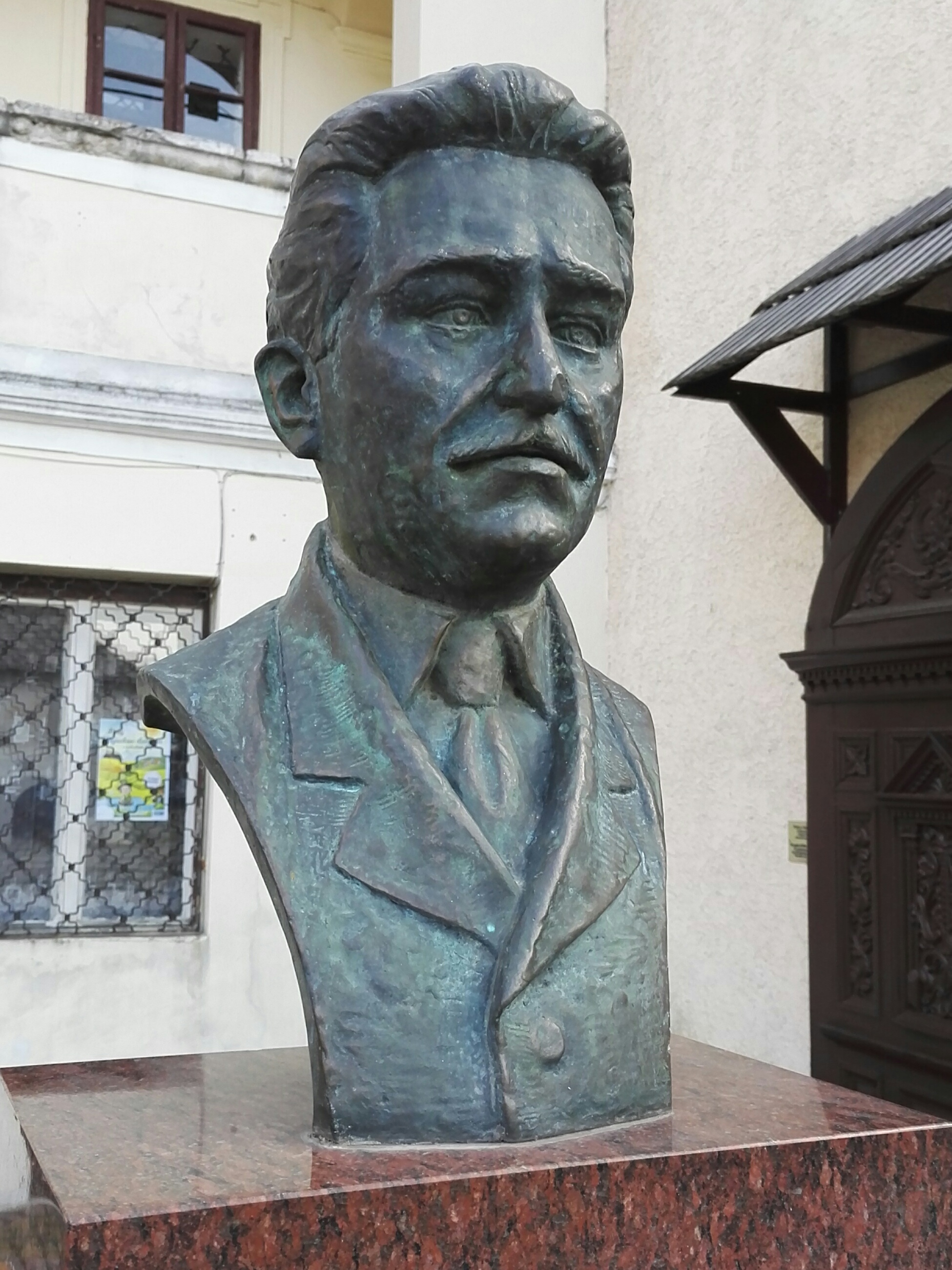 Rajec. Busta Ferdinanda Ďurčanského před muzeem, na Námestí SNP v Rajci.